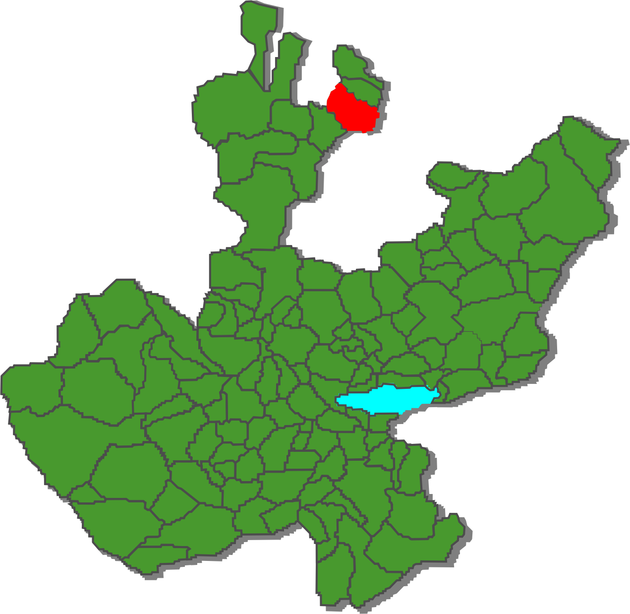 Mapa de ubicación del municipio de Colotlán en Jalisco.